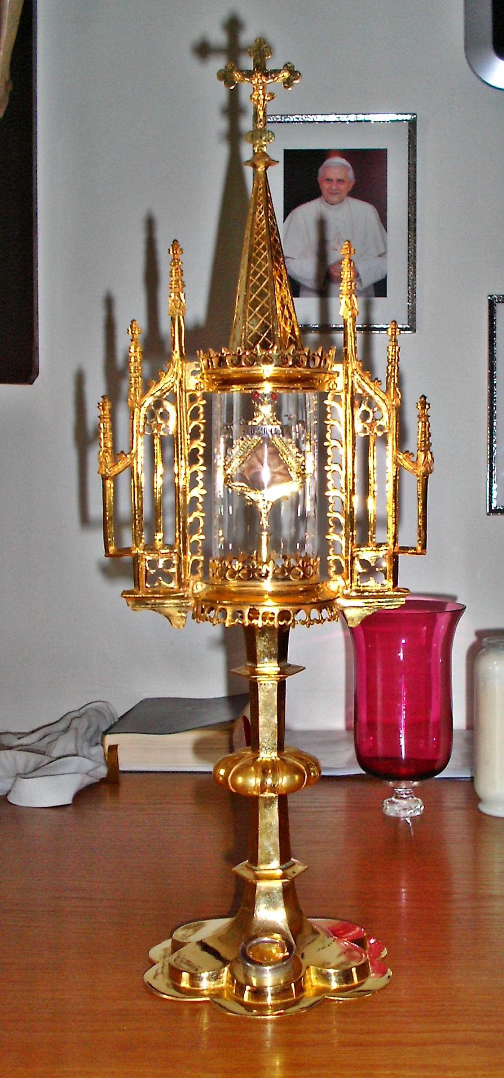 Gotisches Reliquiar mit Schädelreliquie des Hl. Oswald von Northumbria, kath. Pfarrkirche St. Oswald, Boßweiler, Rheinland-Pfalz